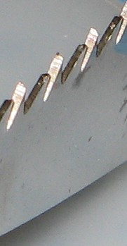 Flankigitaj dentoj de porligna segilo La foto estis farita de mi mem.